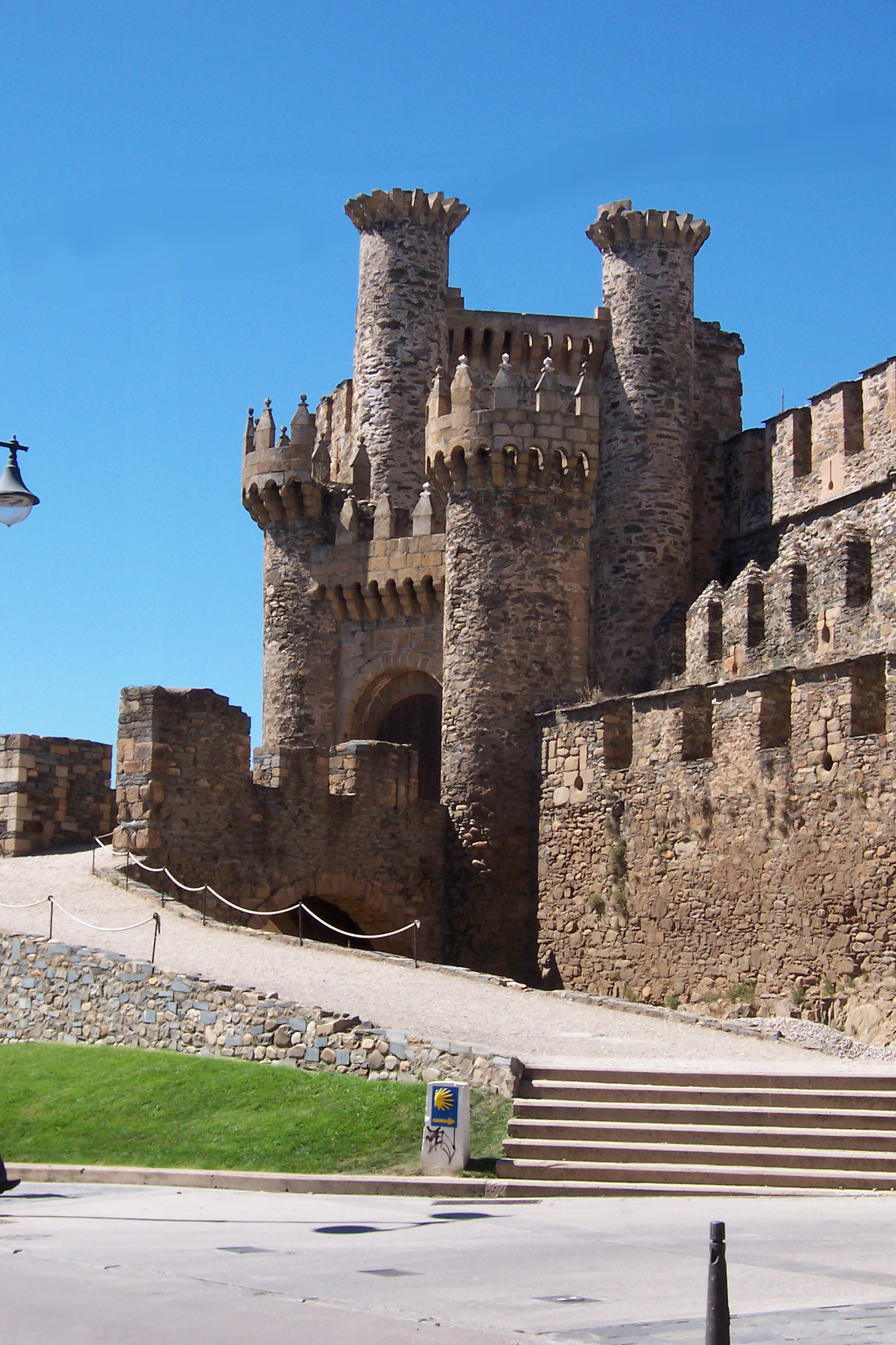 Entrada del Castillo Templario de Ponferrada